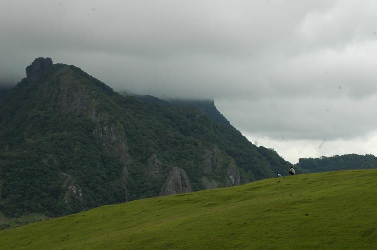 Monte Mundo Perdido, suco Ossu de cima, Osttimor